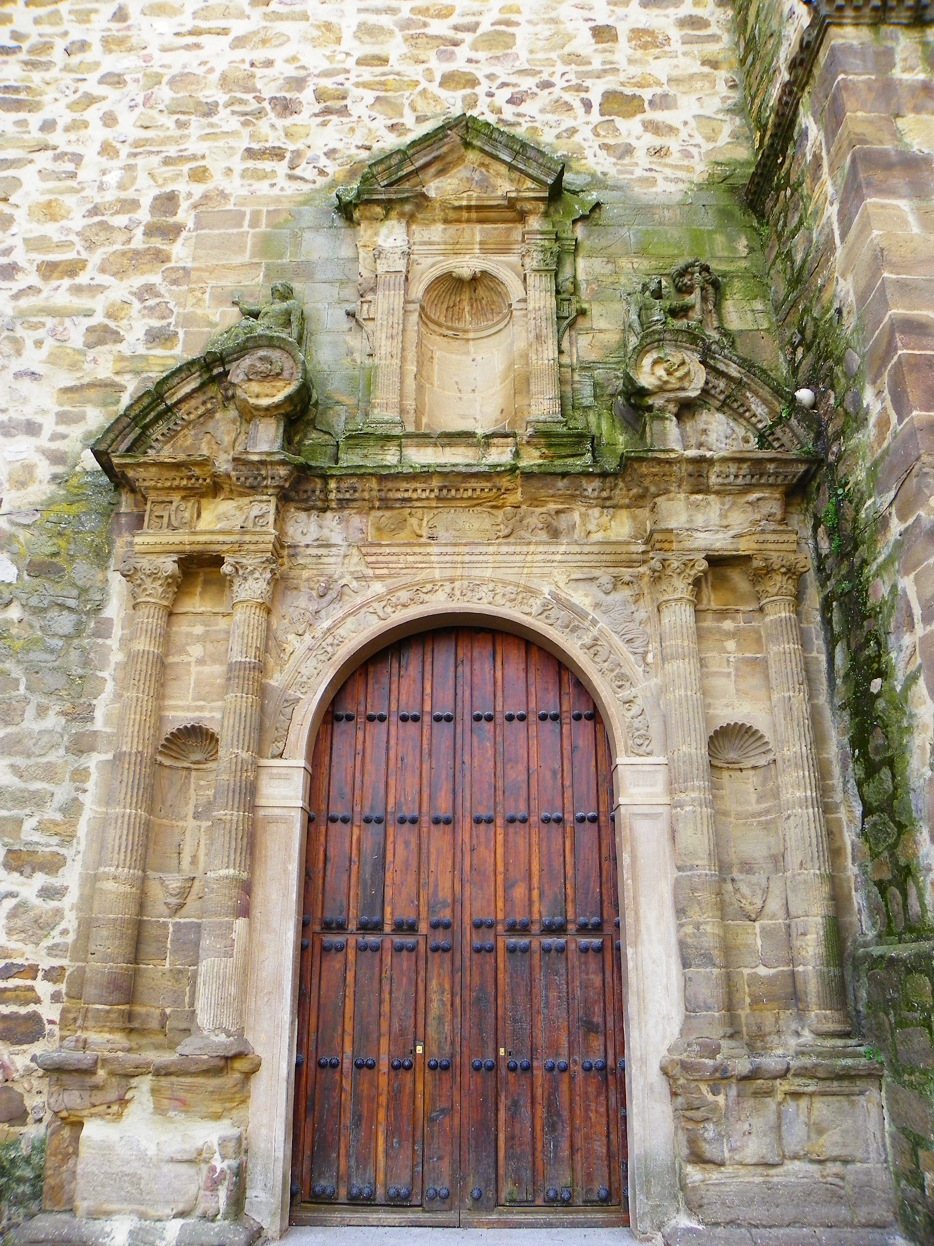 Portada Norte de la Iglesia de la Asunción de Puertollano